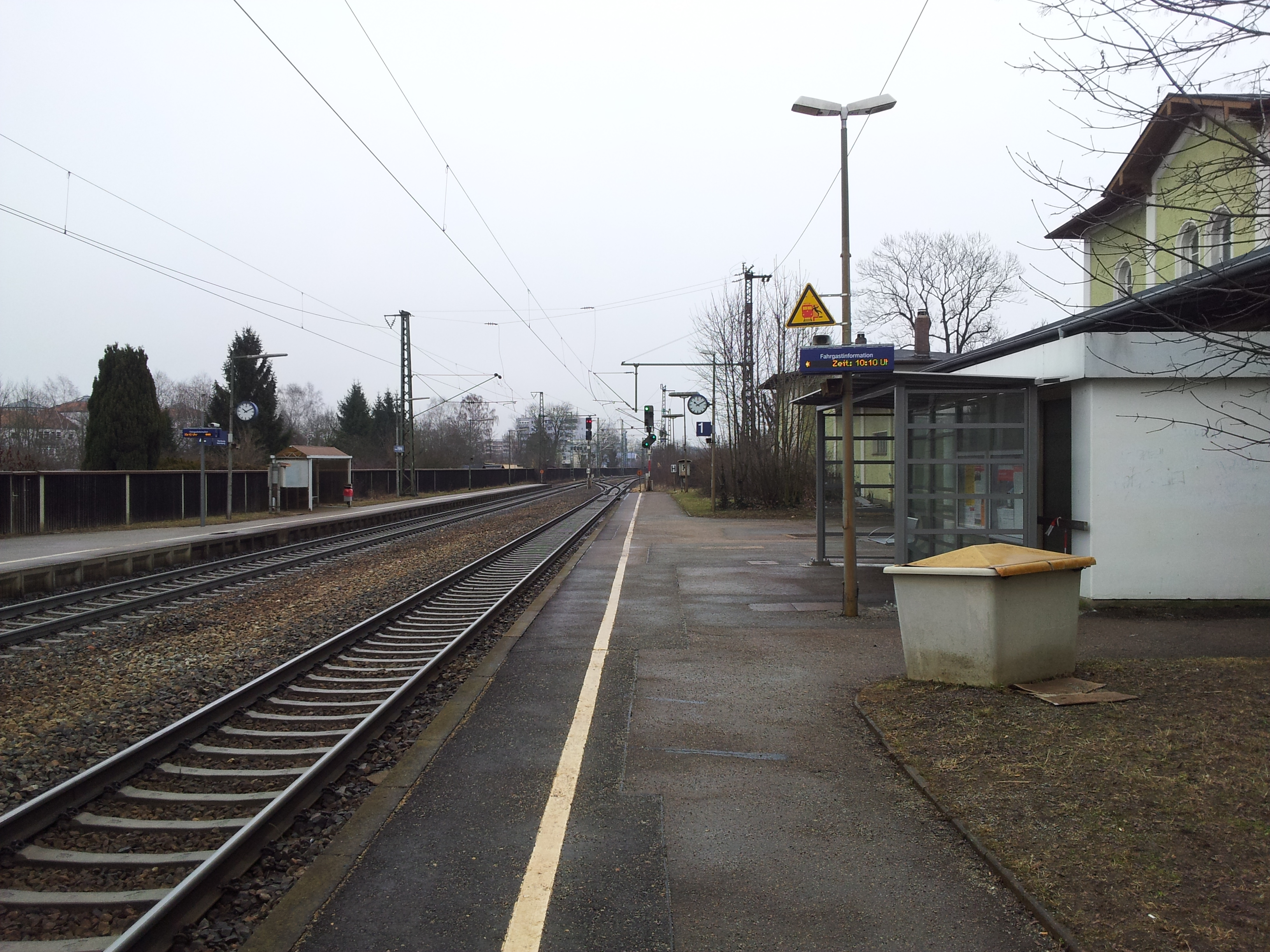 Die Bahnsteige zu den Gleisen 1 und 2 des Bahnhofs Regensburg-Prüfening Richtung Nürnberg